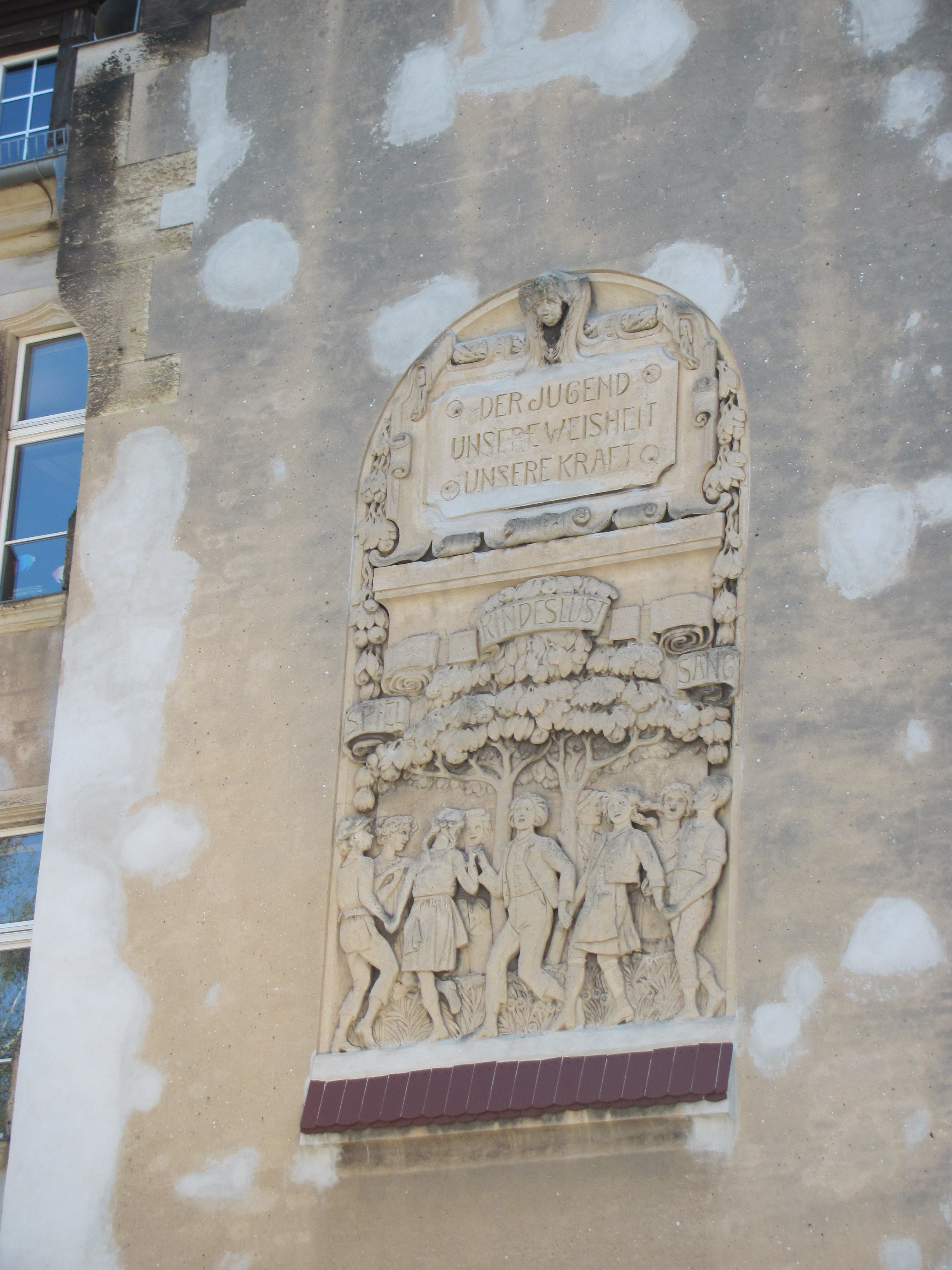 Radebeul Grundschule Kötzschenbroda